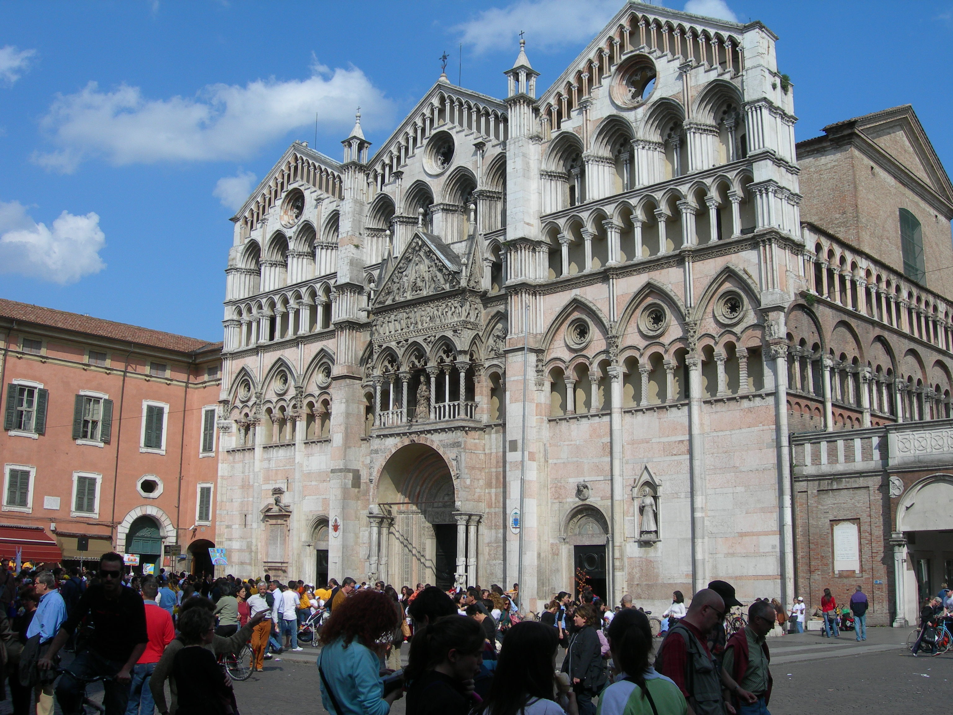 Facciata del Duomo di Ferrara.